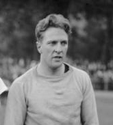 Amerikanische Leichtathleten in Berlin ! Houben, Deutschlands bester Hundert-Meter-Läufer schlägt den Amerikaner Paddock. (x) Houben Mitte mit dem Amerikaner Paddock links und Murchison rechts nach seinem Siege über Beide im Hundert-Meter-Laufen.